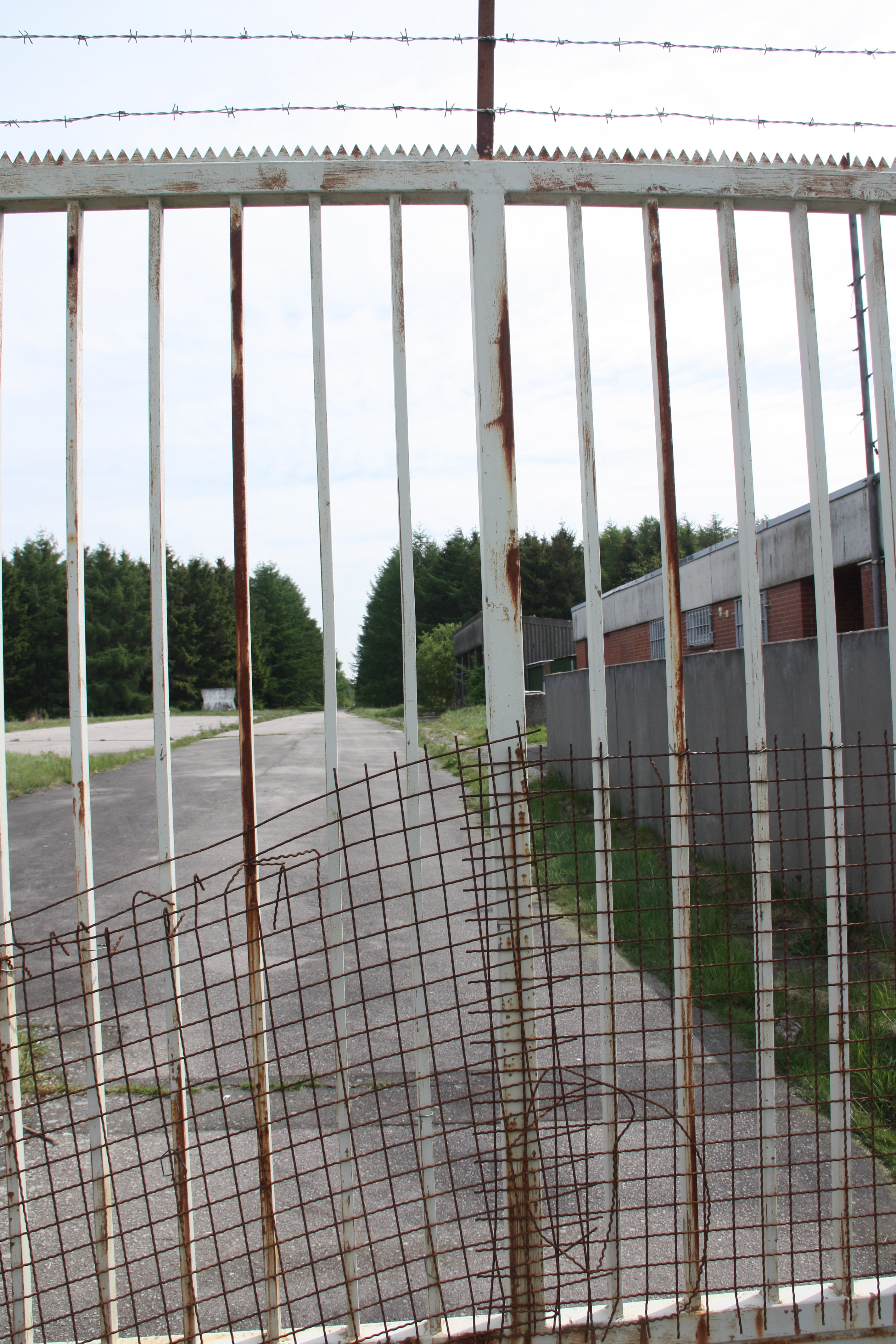 Hamburg, Rahlstedt, Naturschutzgebiet Höltigbaum, Eingang zum ehemaligen Munitionslager